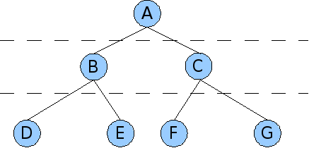 Description: Cette image présente un arbre binaire avec peu de noeuds et une limite entre les niveaux Source: Serge Mostacchi